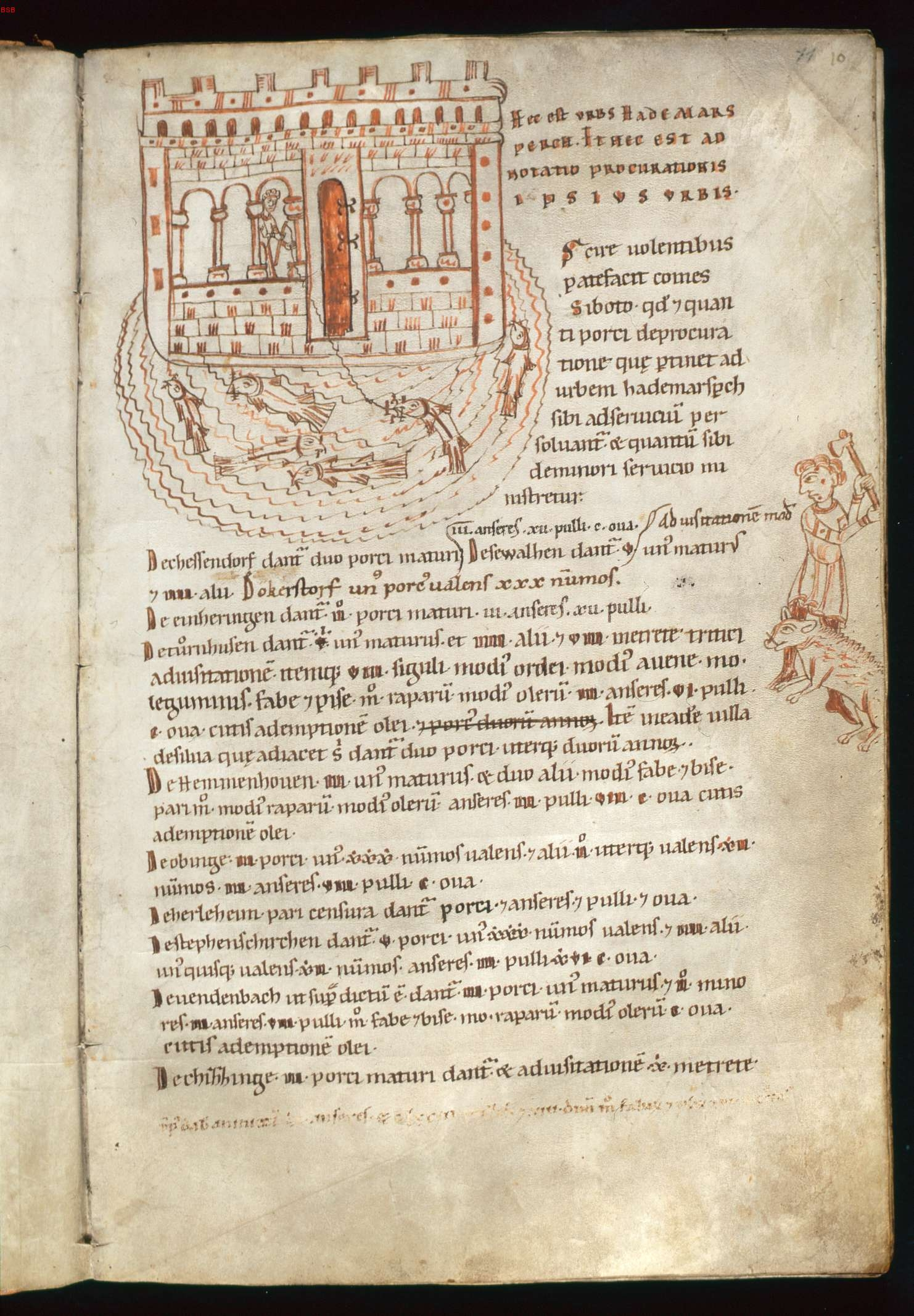 Codex Falkensteinensis - BayHStA KL Weyarn 1, Herrenchiemsee, 1166, Wasserburg Hartmannsberg